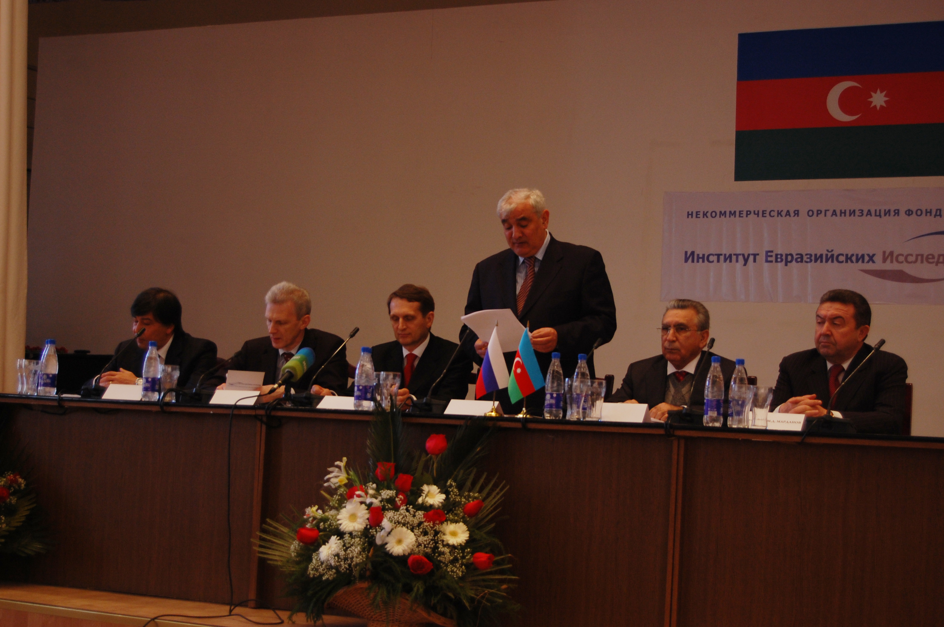 Skachannye-fajly-3